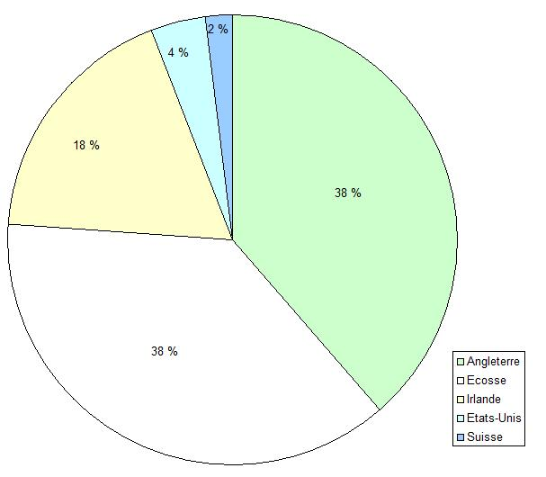 Origine des immigrants à Gladstone (Manitoba, Canada), lors du recensement de 1891.